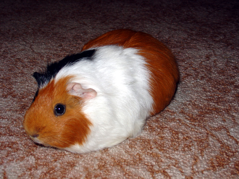 morče guinea pig (Cavia porcellus) Czech republic 2005 self made